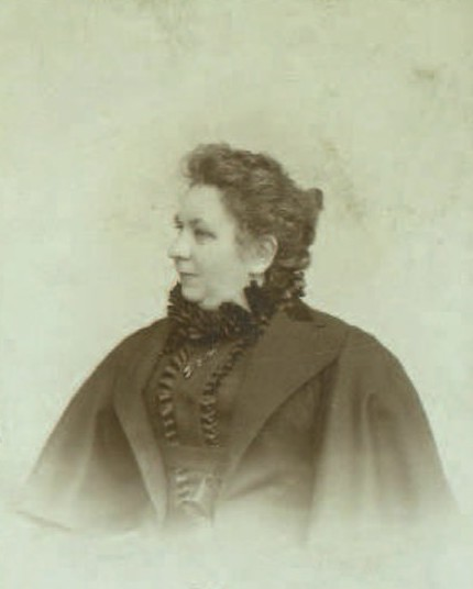 Vlasta Pittnerová (1858 - 1926), Česká spisovatelka.